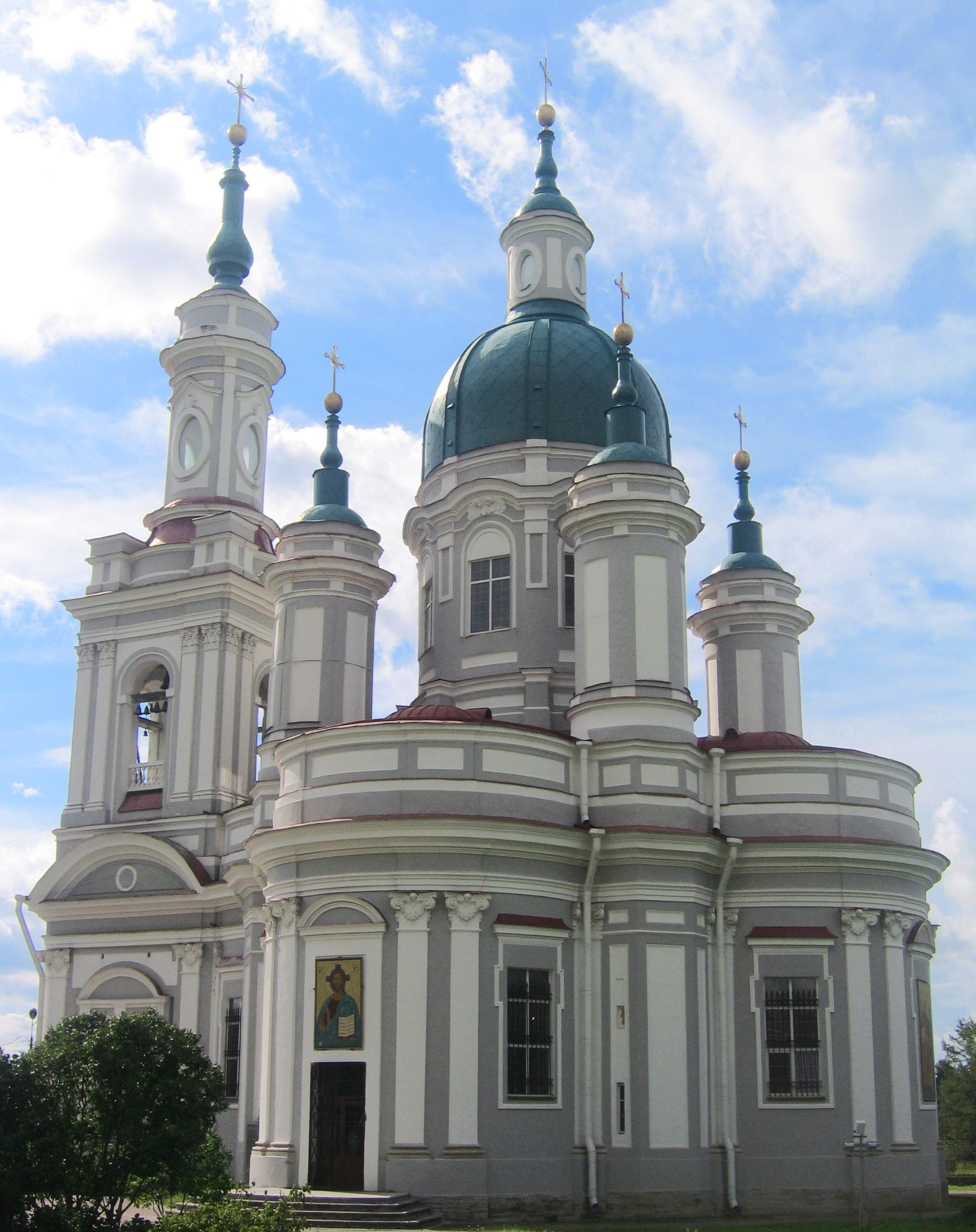 Ямбург, Екатерининский собор